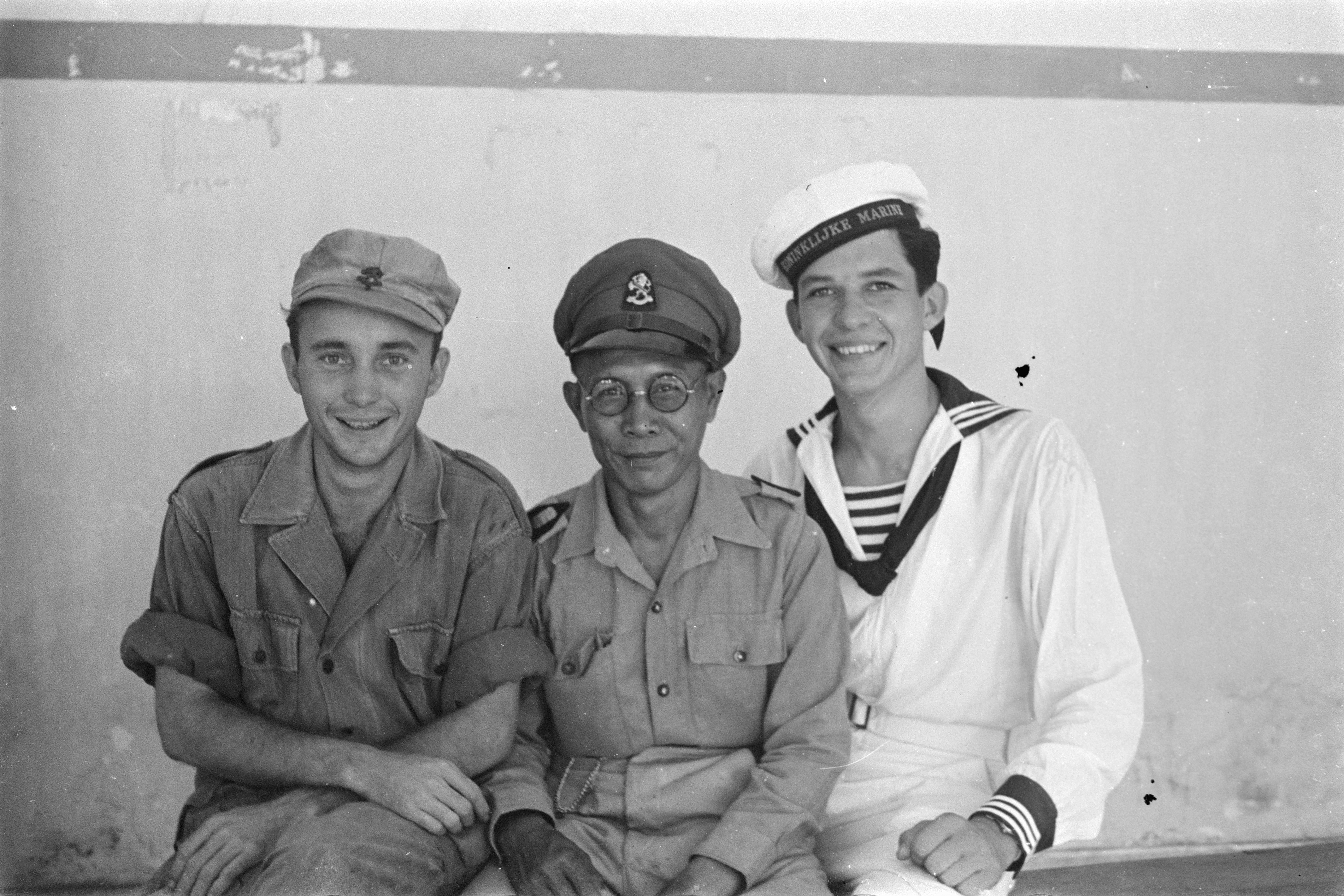 Collectie / Archief : Fotocollectie Dienst voor Legercontacten Indonesië Reportage / Serie : [DLC] Portretfoto´s (diversen) [pasfoto´s] Beschrijving : Drie personen, voorstellende de legeronderdelen Landmacht, KNIL en Marine Datum : 1947/01/01 Locatie : Indonesië, Nederlands-Indië Fotograaf : Fotograaf Onbekend / DLC Auteursrechthebbende : Nationaal Archief Materiaalsoort : Negatief (zwart/wit) Nummer archiefinventaris : bekijk toegang 2.24.04.02 Bestanddeelnummer : 6362